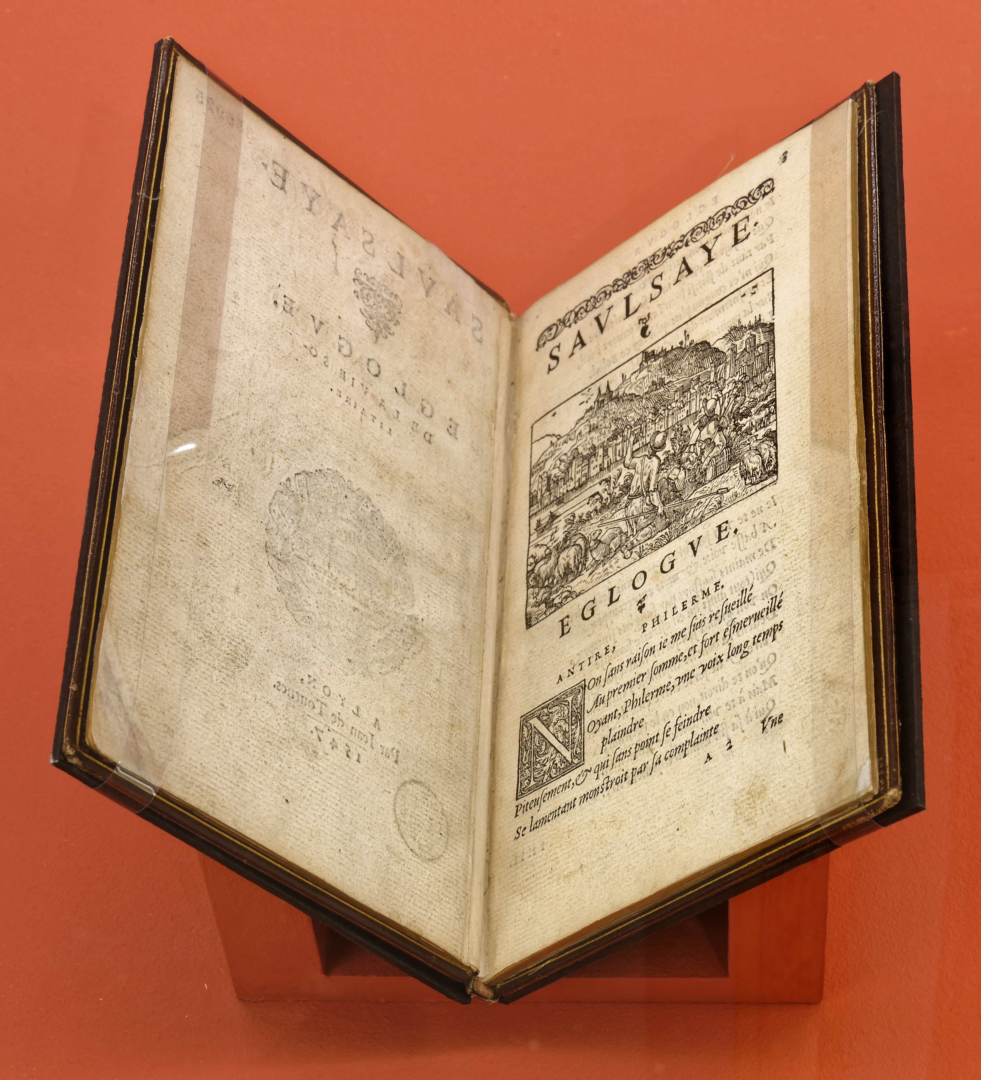 Exposition Lyon Renaissance. Arts et humanisme. Cat. 3. La Saulsaye, églogue de la vie solitaire, livre de Maurice Scève, illustration de Bernard Salomon, montrant deux bergers devant Lyon. Edité à Lyon 1547 par Jean de Tournes